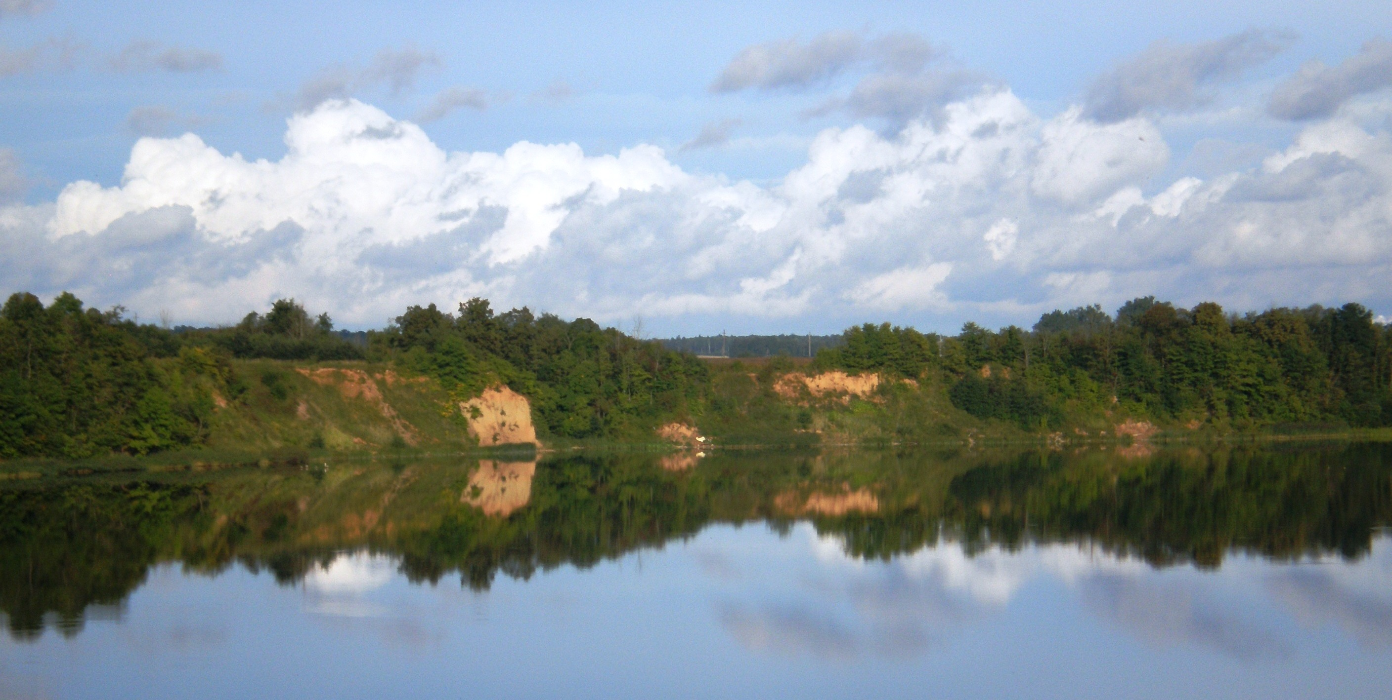 Pilsupių atodanga, Angirių tvenkinys, Kėdainių rajonas, Lietuva